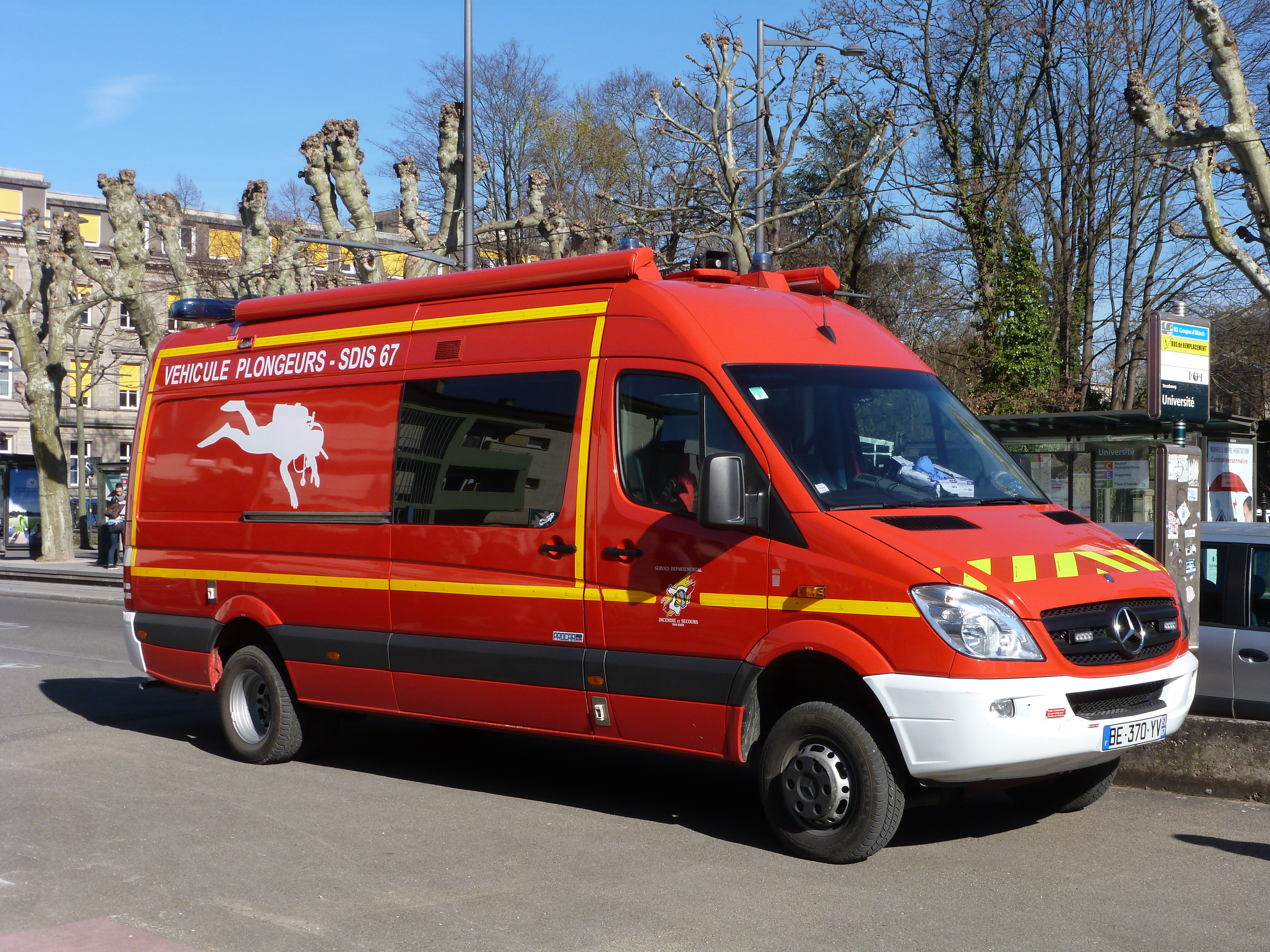 Véhicule plongeur du Service départemental d'incendie et de secours du Bas-Rhin.